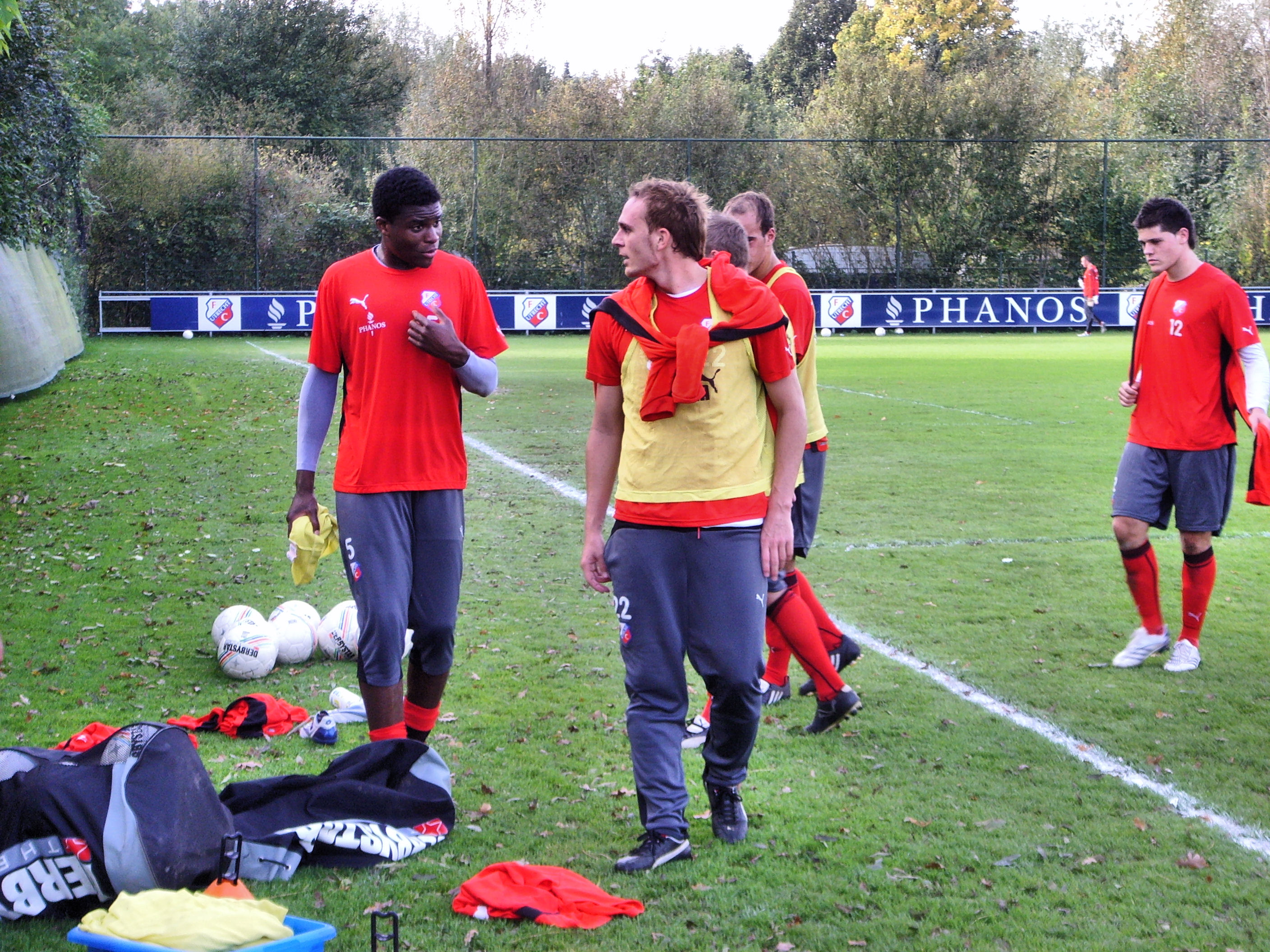 Spelers na een training van eredivisionist FC Utrecht. Van links naar rechts Francis Dickoh, Sander Keller, Kees van Buuren, Mike van der Kooy, Nick Kuipers.